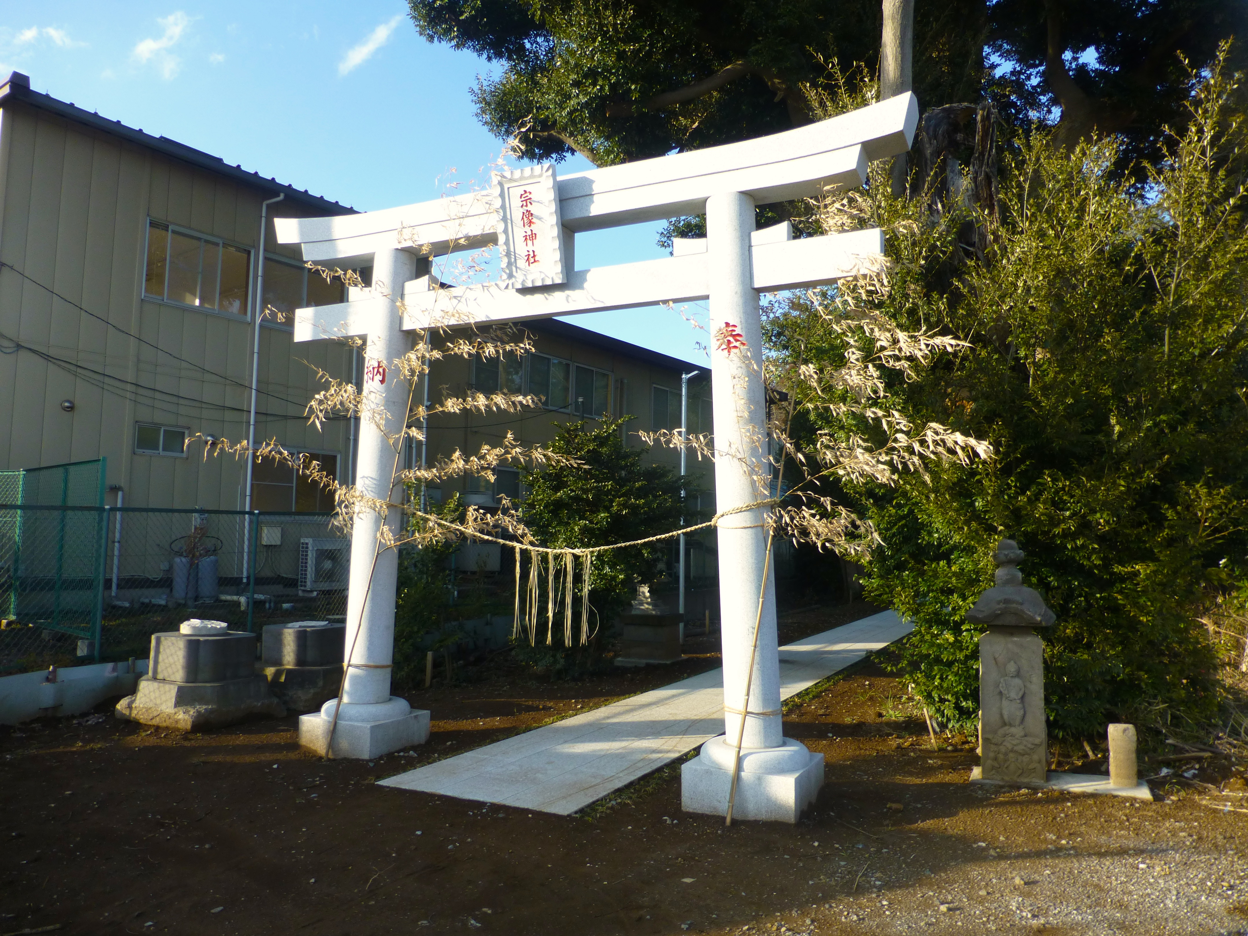 宗像神社(むなかたじんじゃ)は千葉県白井市清戸に存在する神社である。(Munakata-jinja is a Shinto shrine in Shiroi, Chiba)